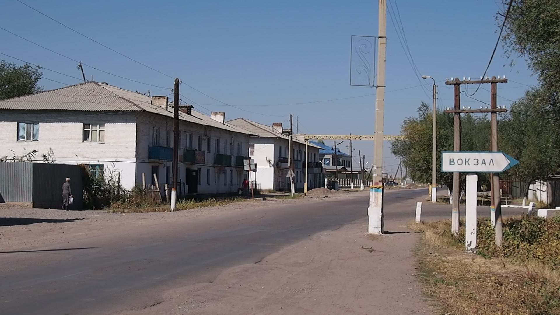 Lugowoi, Kasachstan, unweit des Bahnhofes